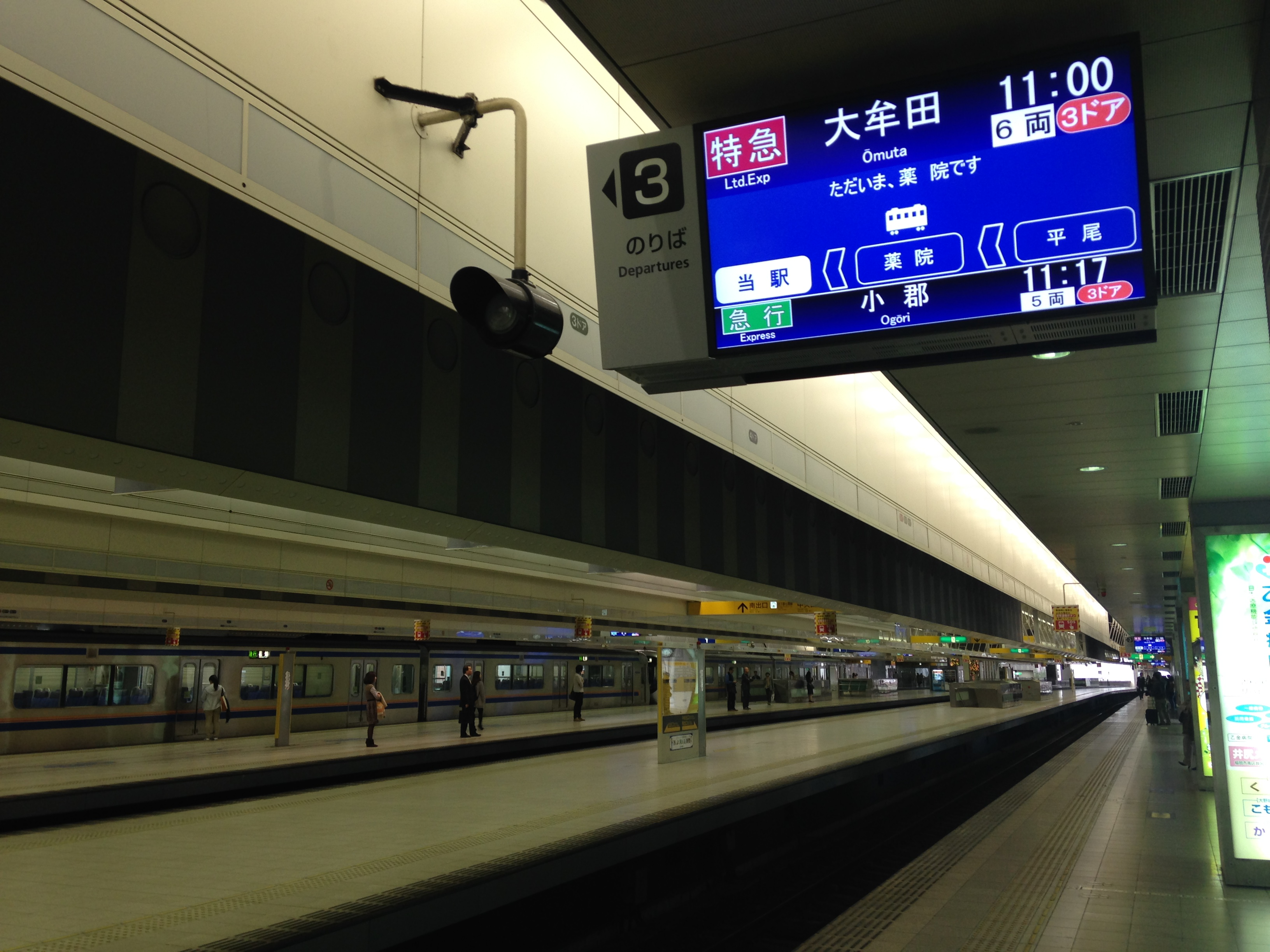 西鉄福岡(天神)駅・3番乗り場とLCD発車標